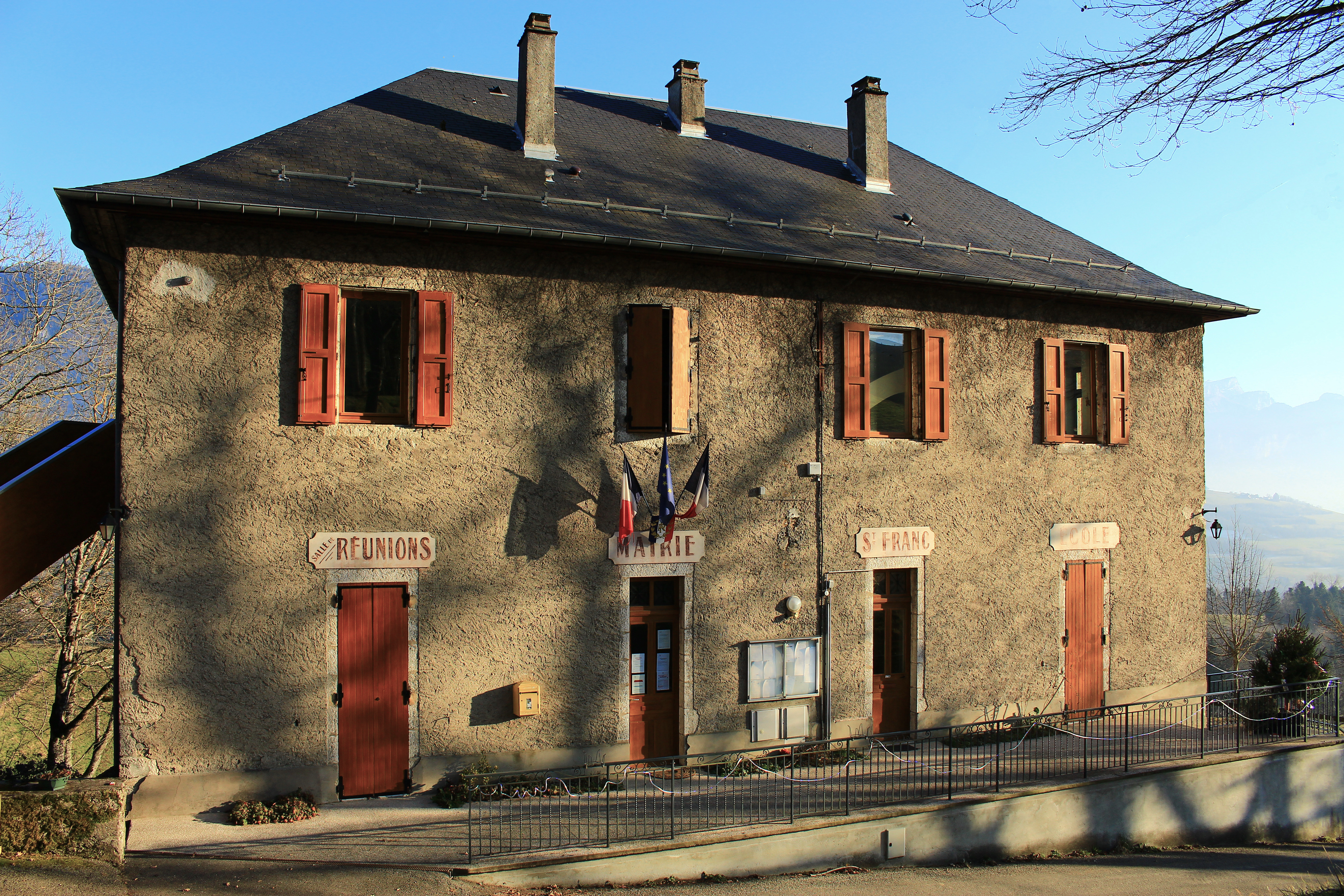 Mairie de Saint-Franc (Savoie). Edifice construit en 1881. Saint-Franc, Savoie, France. Décembre 2016